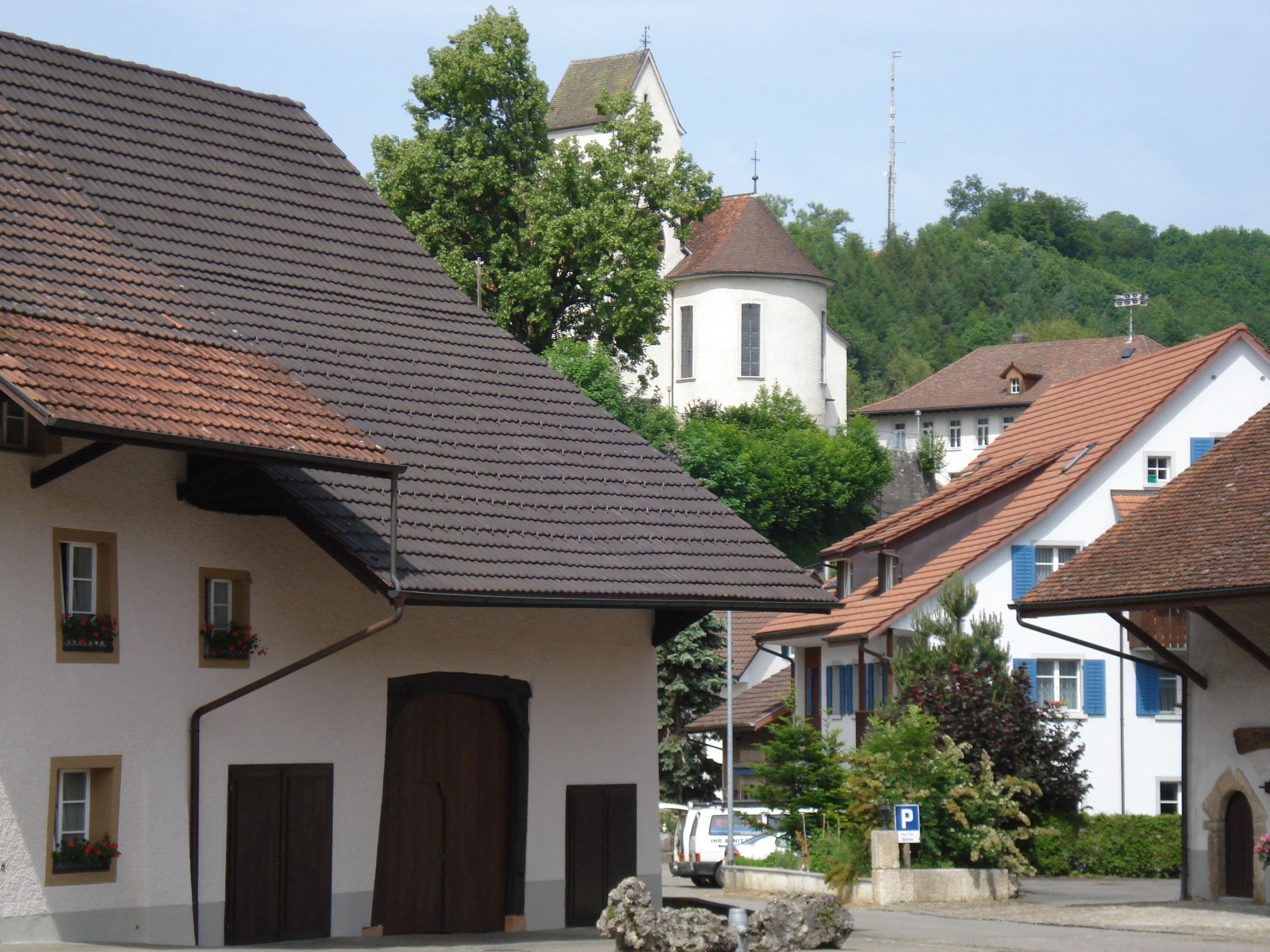 Wölflinswil Dorfplatz